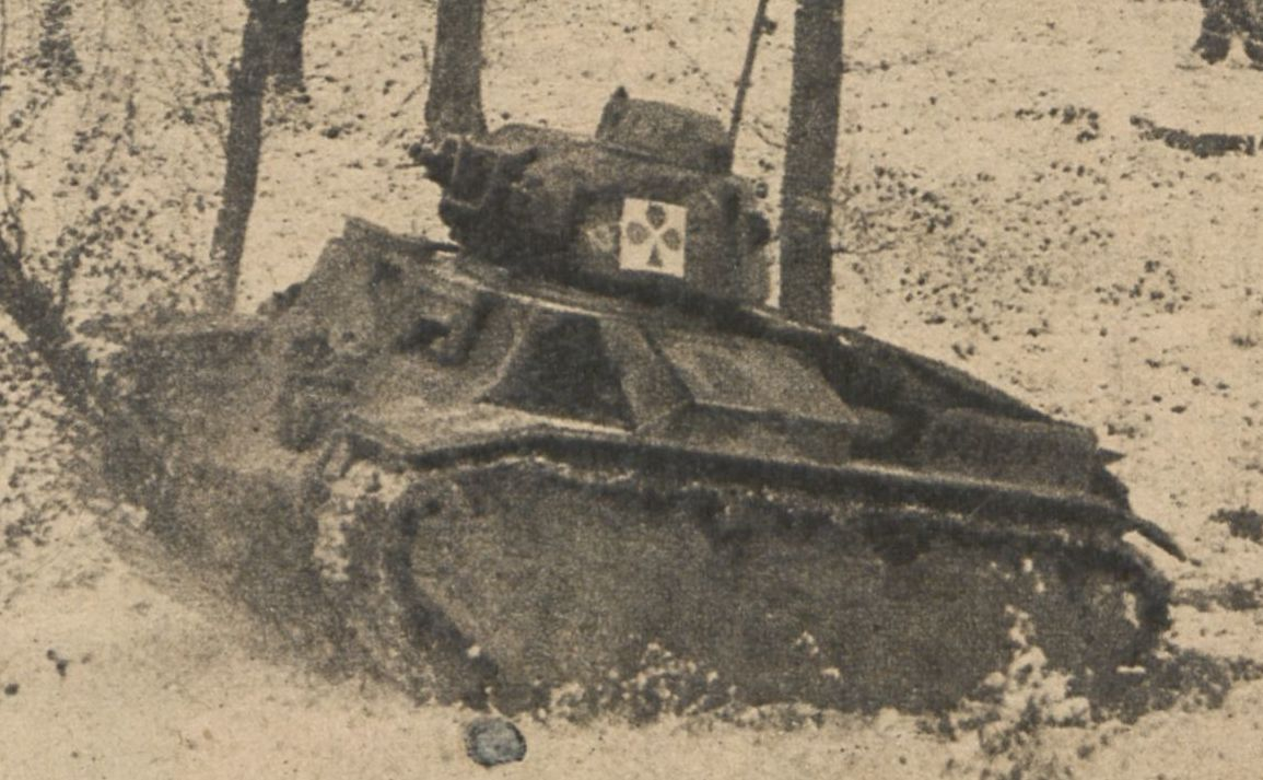 LES CHARS D'ASSAUT sont parfois conciliants et routiniers, et ils suivent alors docilement les voies et les chemins, même forestiers, dont leurs chenilles s'accommodent fort bien ; mais la neige ne les empêche pas de couper, s'il le faut, à travers champs et bois, et un arbre, même robuste, ne constitue pas un obstacle suffisant pour détourner le char de sa direction. Janvier 1940. [D2 Neerwinden 1/19e BCC]